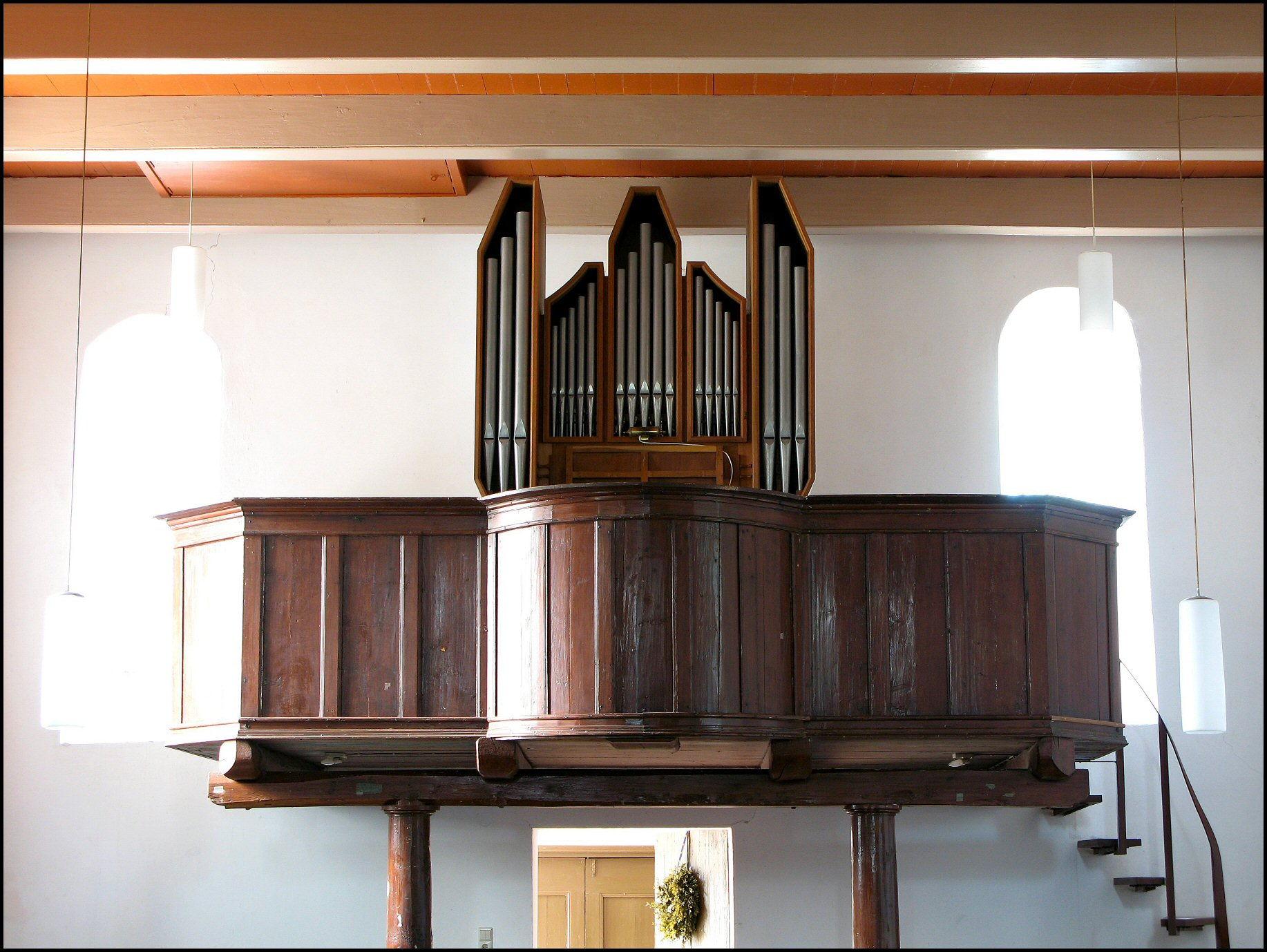 Orgel in Resterhafe, Landkreis Aurich